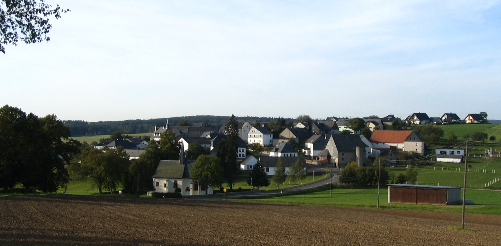 Metzenhausen, Hunsrück aus südlicher Richtung